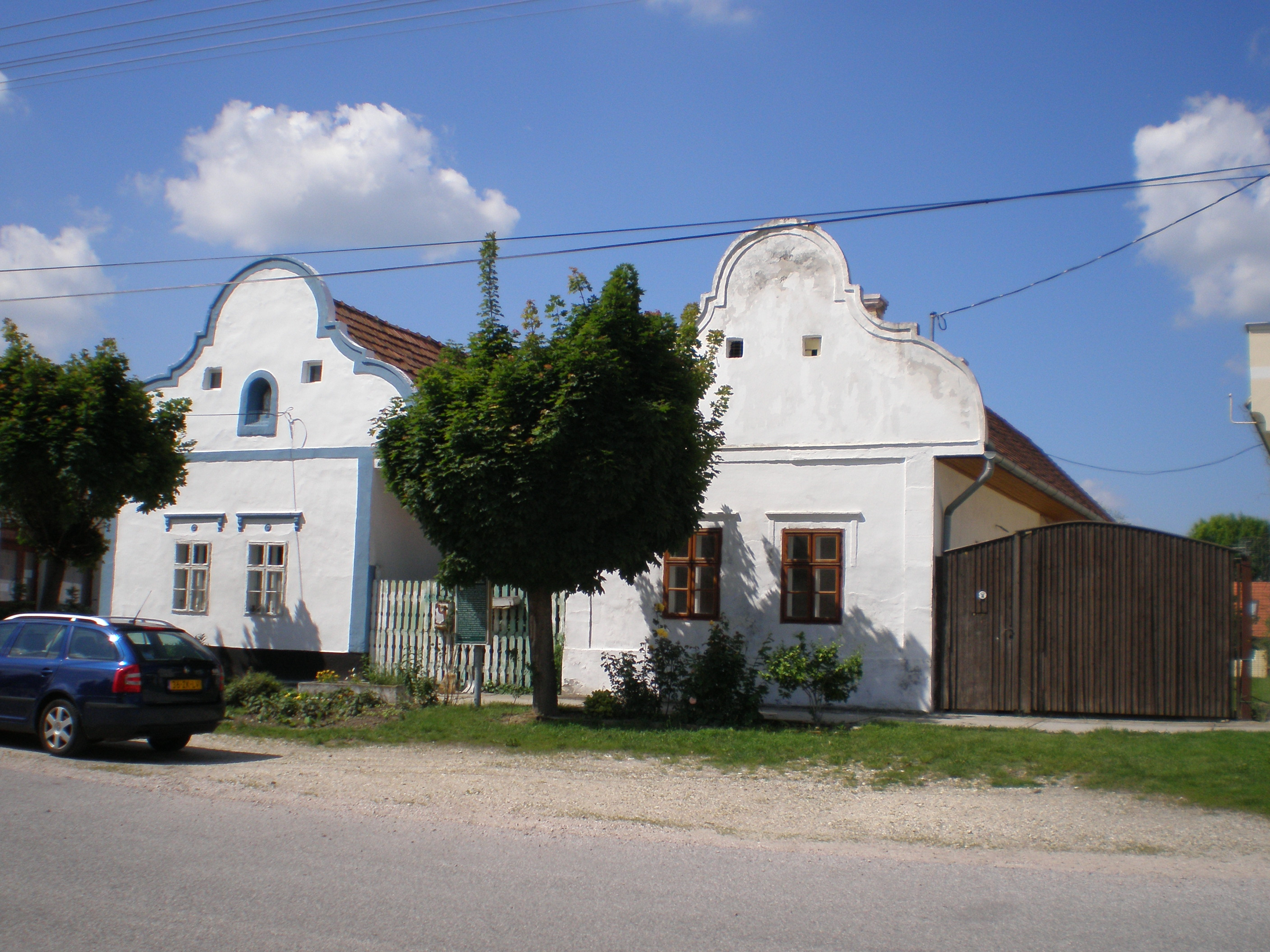 Oromfalas paraszt barokk házak